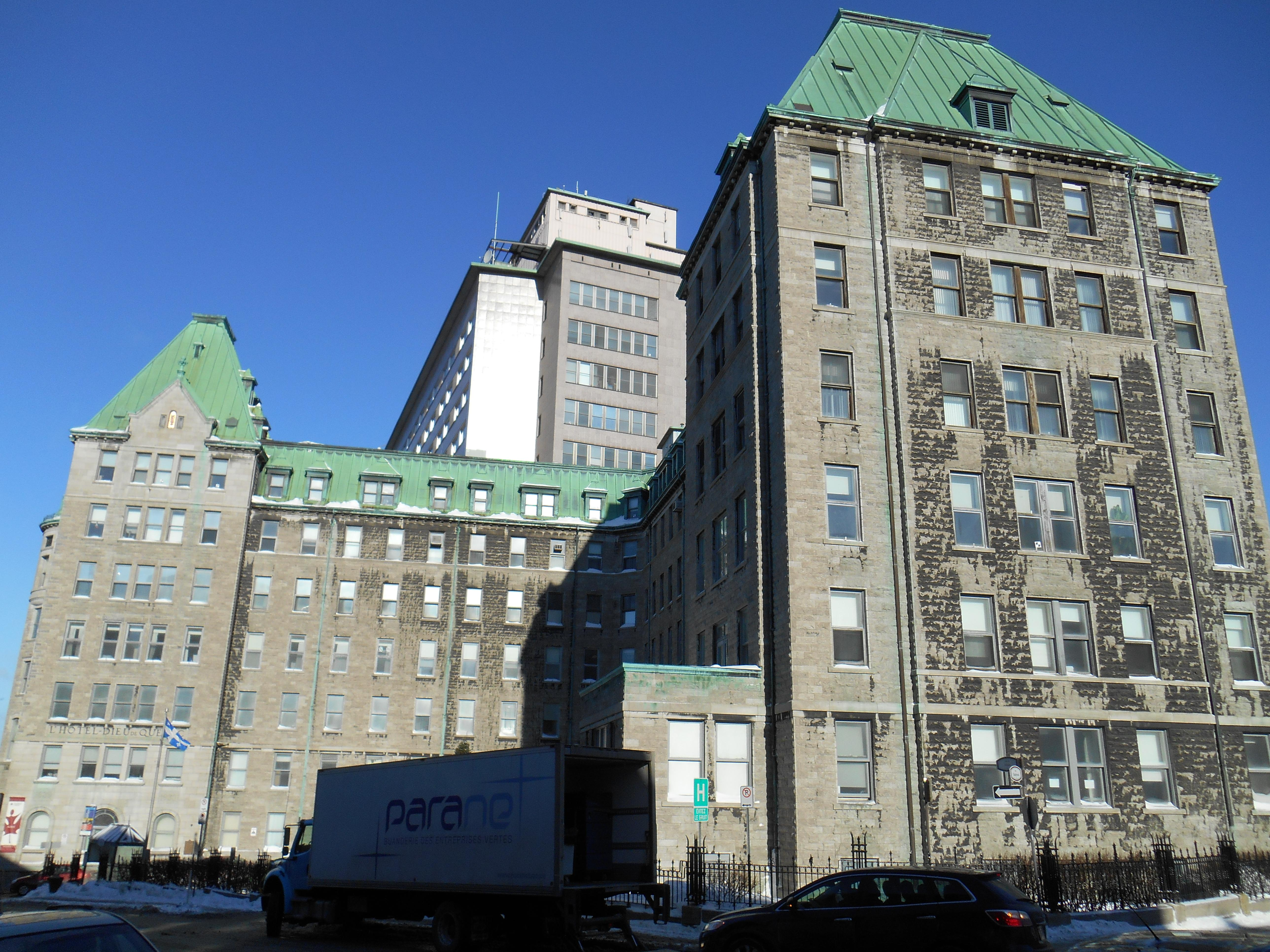 Hôtel-Dieu de Québec